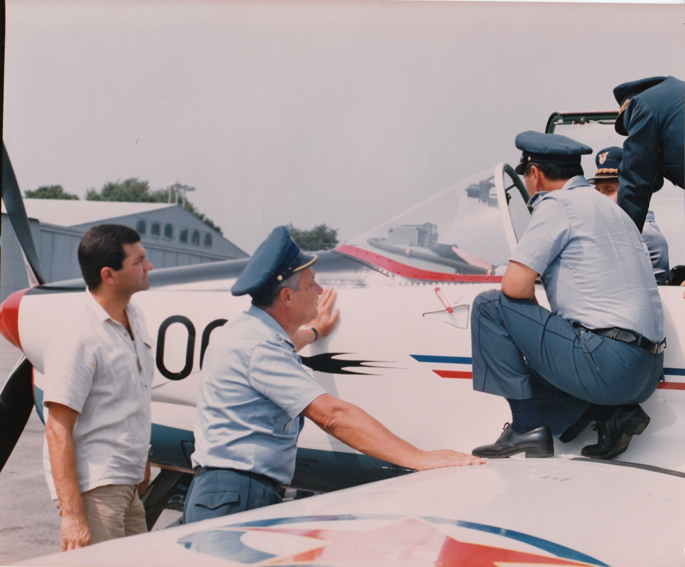 Direktor projekta. Sahara, snimio 1986.g.